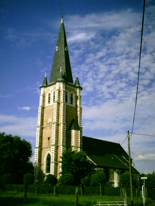 Église Saint-Vaast